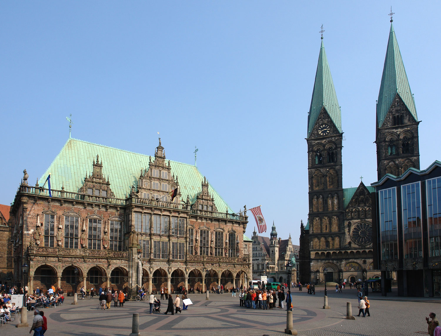 Rathaus in Bremen mit dem Dom und der Bremischen Bürgerschaft